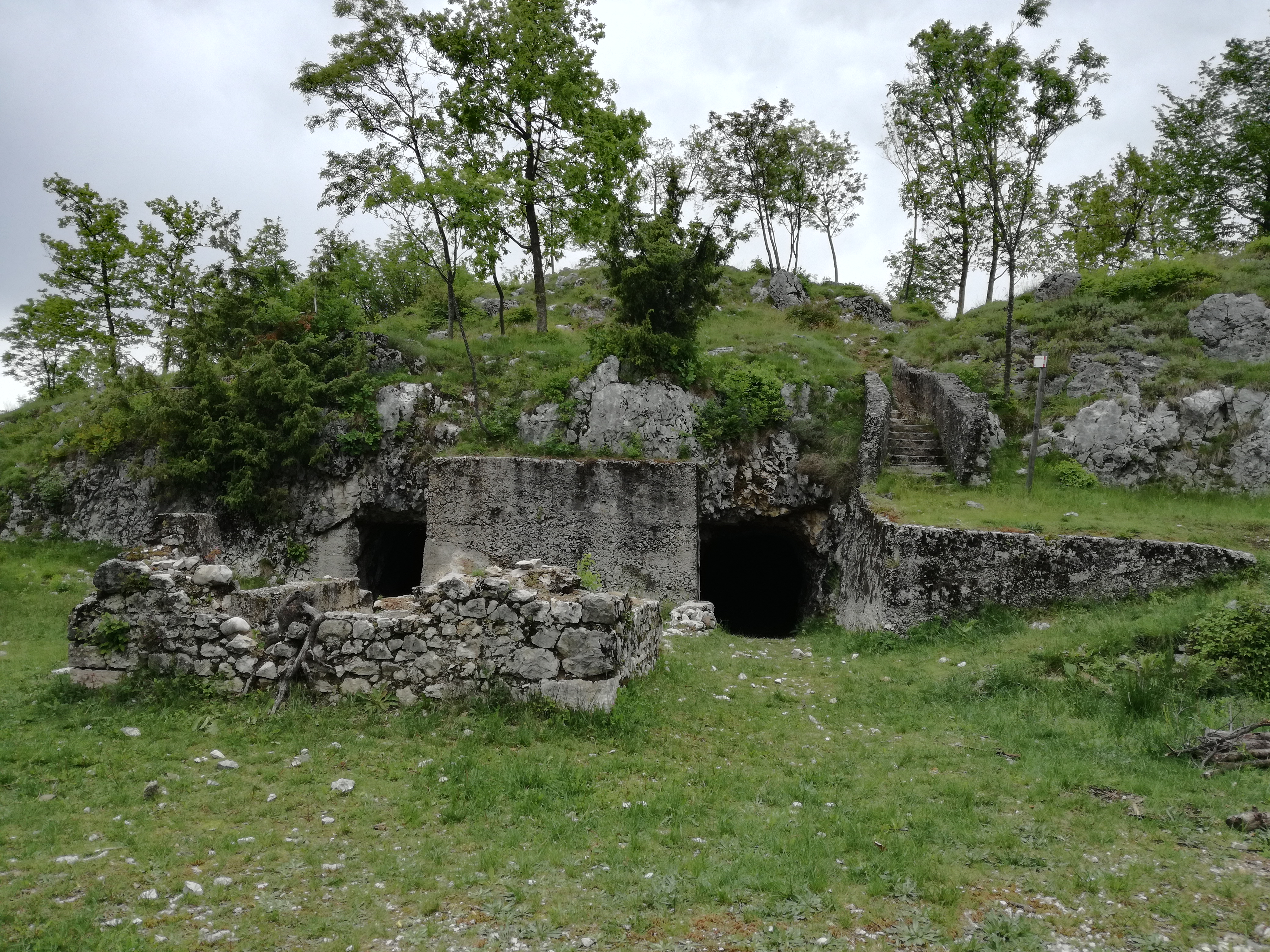 italienischer Stützpunkt am Monte Giovo zwischen Brentonico und Mori (Trentino)